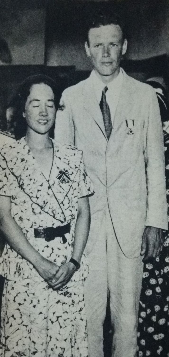 飛行協会から勲章を授与されたリンドバーグ夫妻